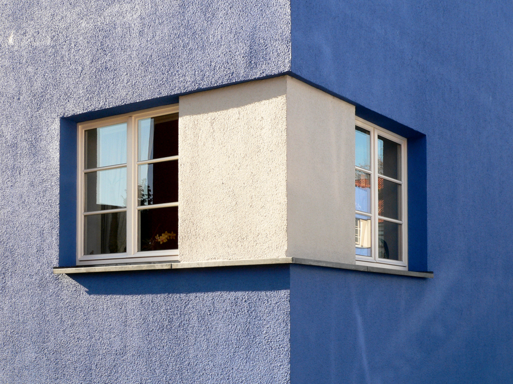 Siedlung Italienischer Garten in Celle